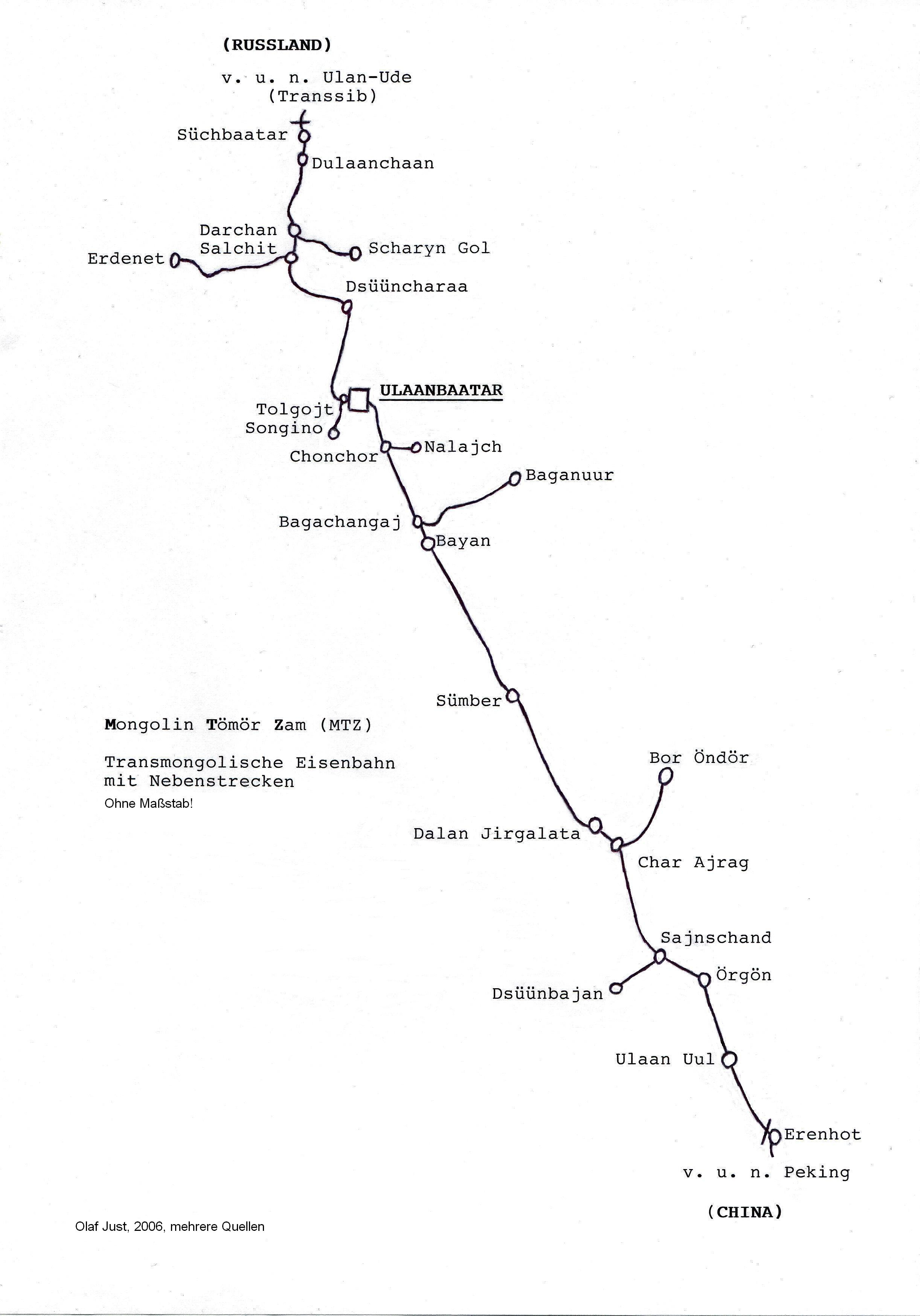 Das Netz der Transmongolischen Eisenbahn mit ihren Nebenstrecken